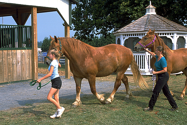 Suffolk Punch Draft Horse